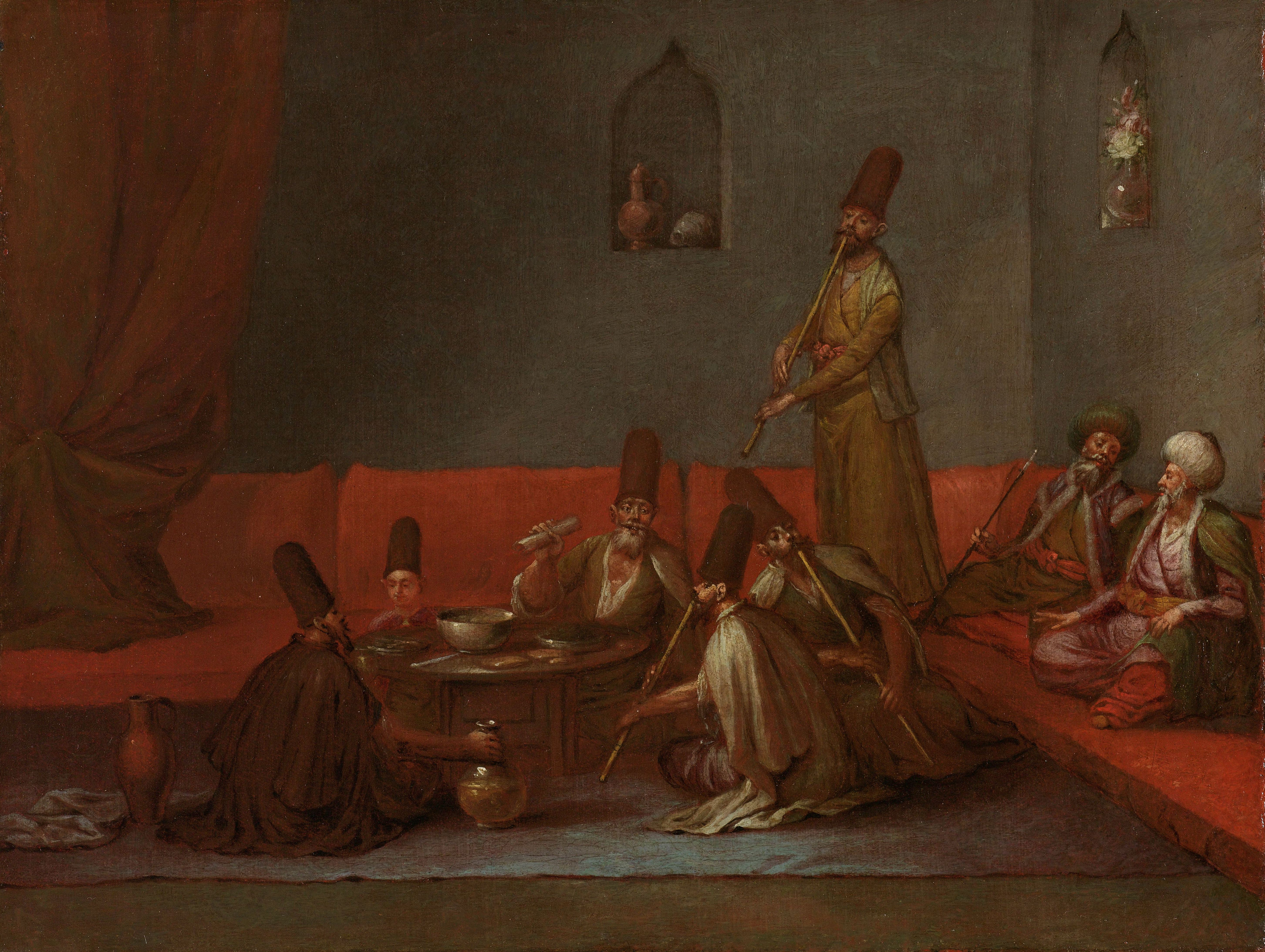 Een grote tekke zoals die in de diplomatenwijk Pera omvatte naast de gebedshal ook een woongedeelte, een bibliotheek, een eetzaal en een keuken. De derwisjen dragen de kenmerkende cilindervormige hoed, de sikke, en lange wollen kleding. Collection: schilderijen; Vanmour serie; Jean Baptiste Vanmour (1671-1737), olieverf op doek, ca. 1720-1737